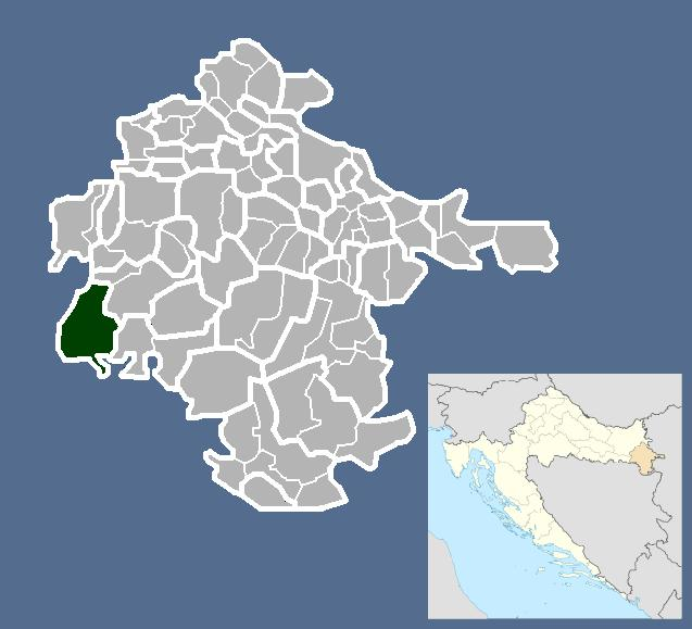 Српски (ћирилица): Општина Бабина Греда.